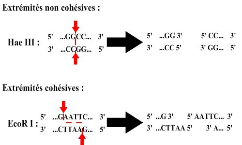 Digestion d'ADN par des endonucléase, obtention de brins cohésifs ou non.